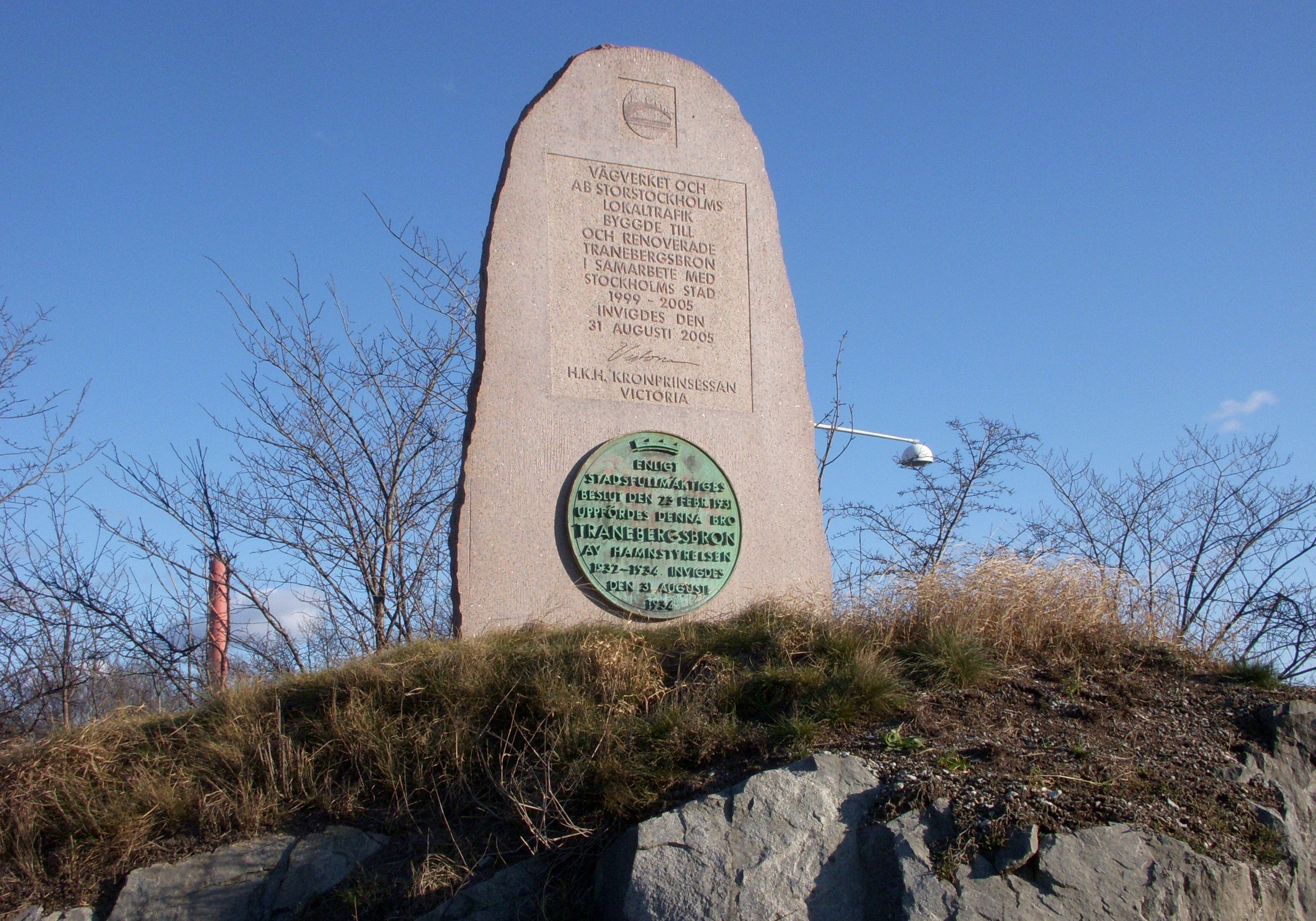 Minnessten vid Tranebergsbrons västra landfäste